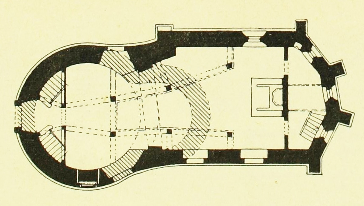 Grundris der Andreaskapelle in Leipzig-Knautnaundorf nach C. Gurlitt. Zustand 1894, vormaliger Bau schraffiert.